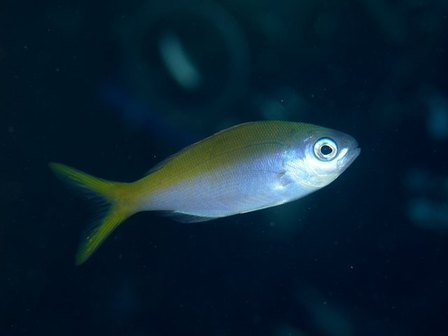 ウメイロ Paracaesio xanthura